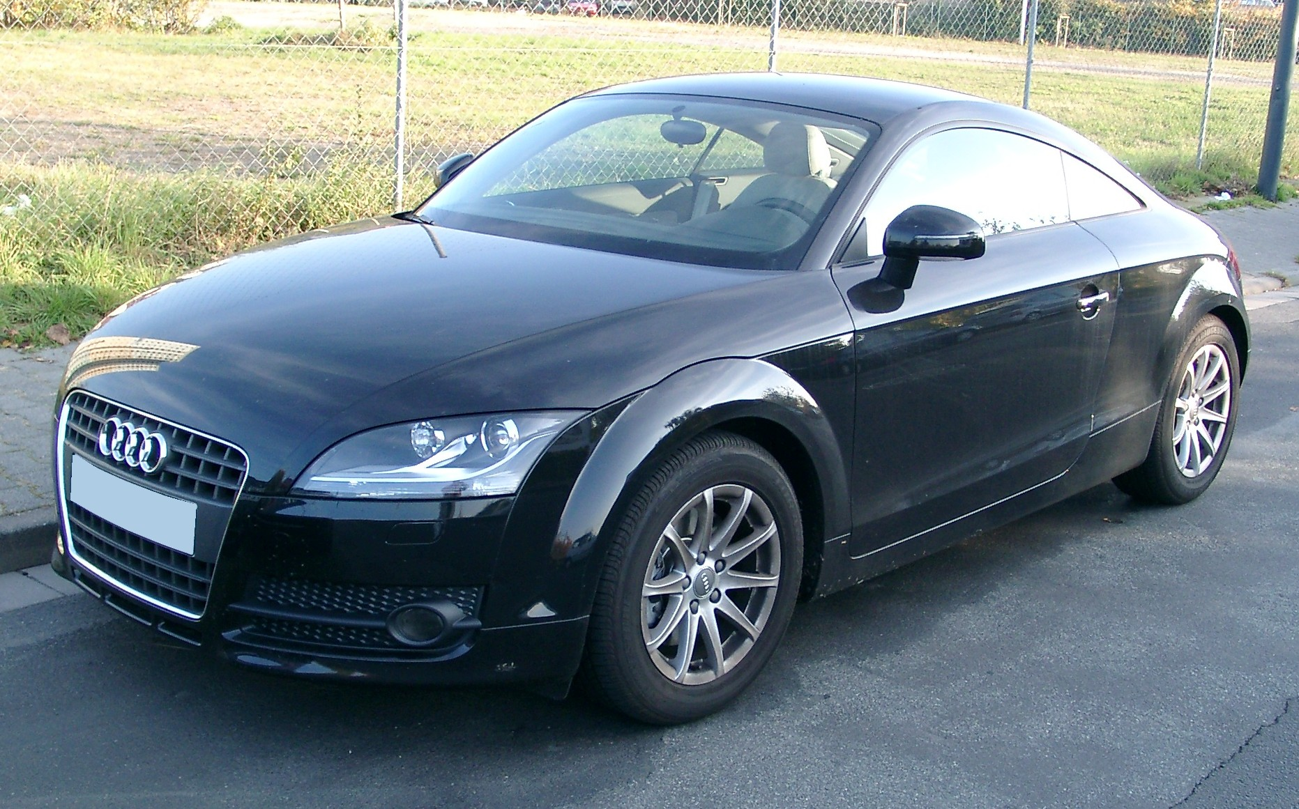 Audi TT, 2. Generation